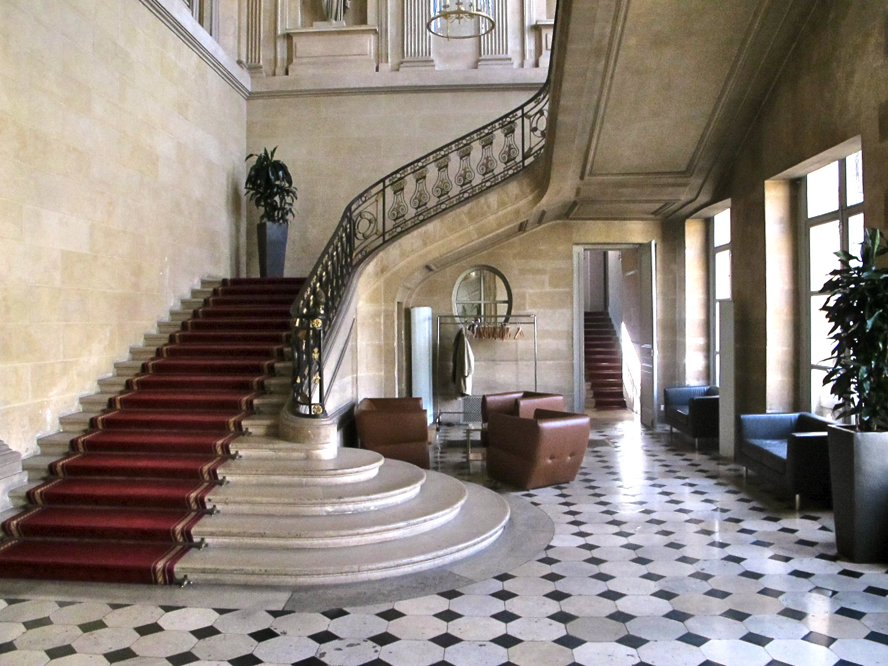 Escalier d'honneur de l'hôtel du Châtelet (Paris).